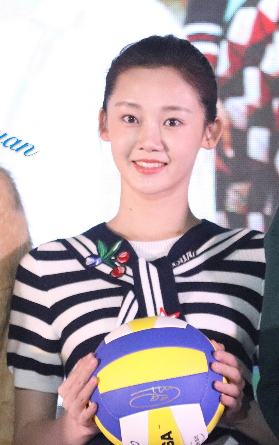 20171121 青春抛物线发布会